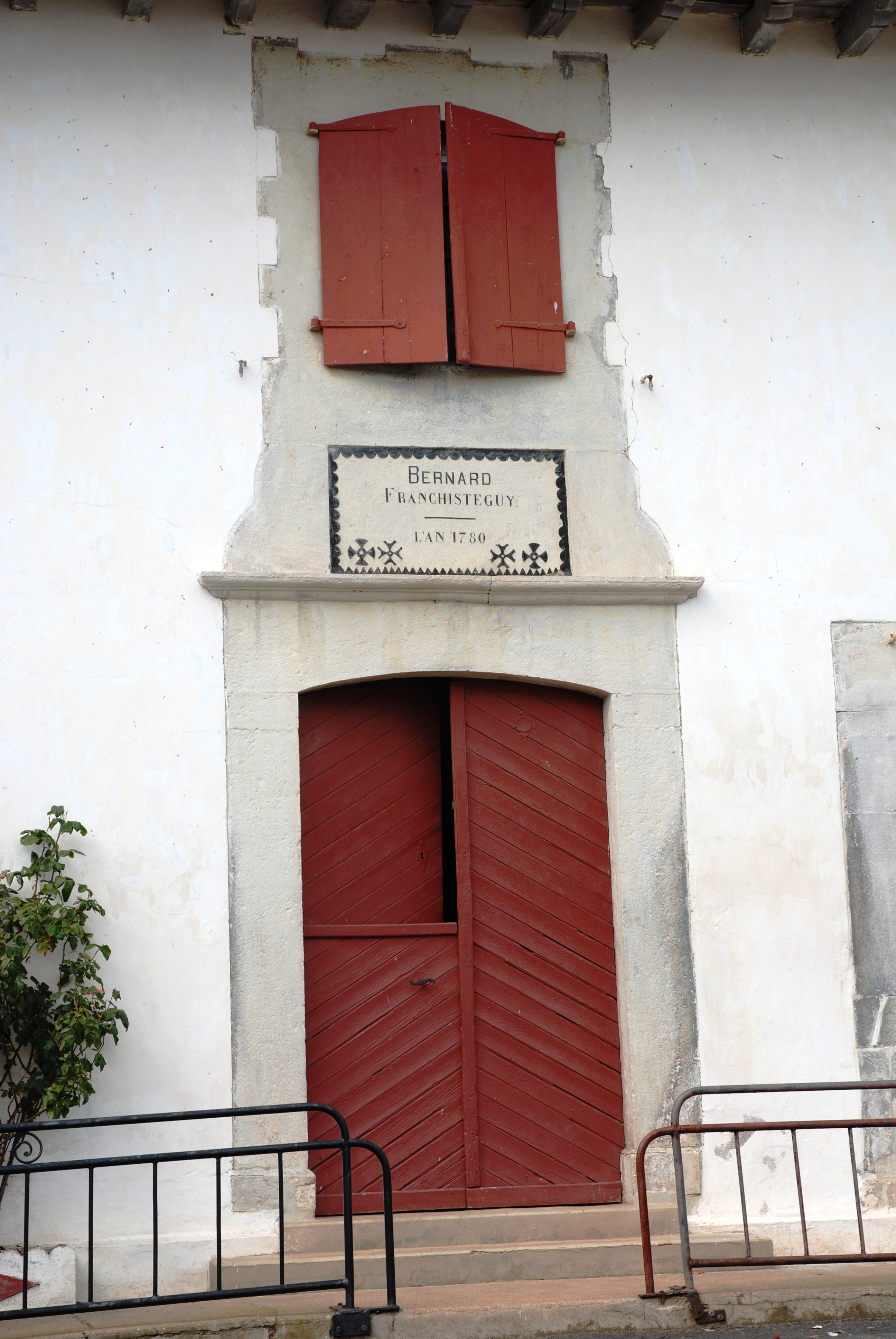 Hélette, Porte bouteille